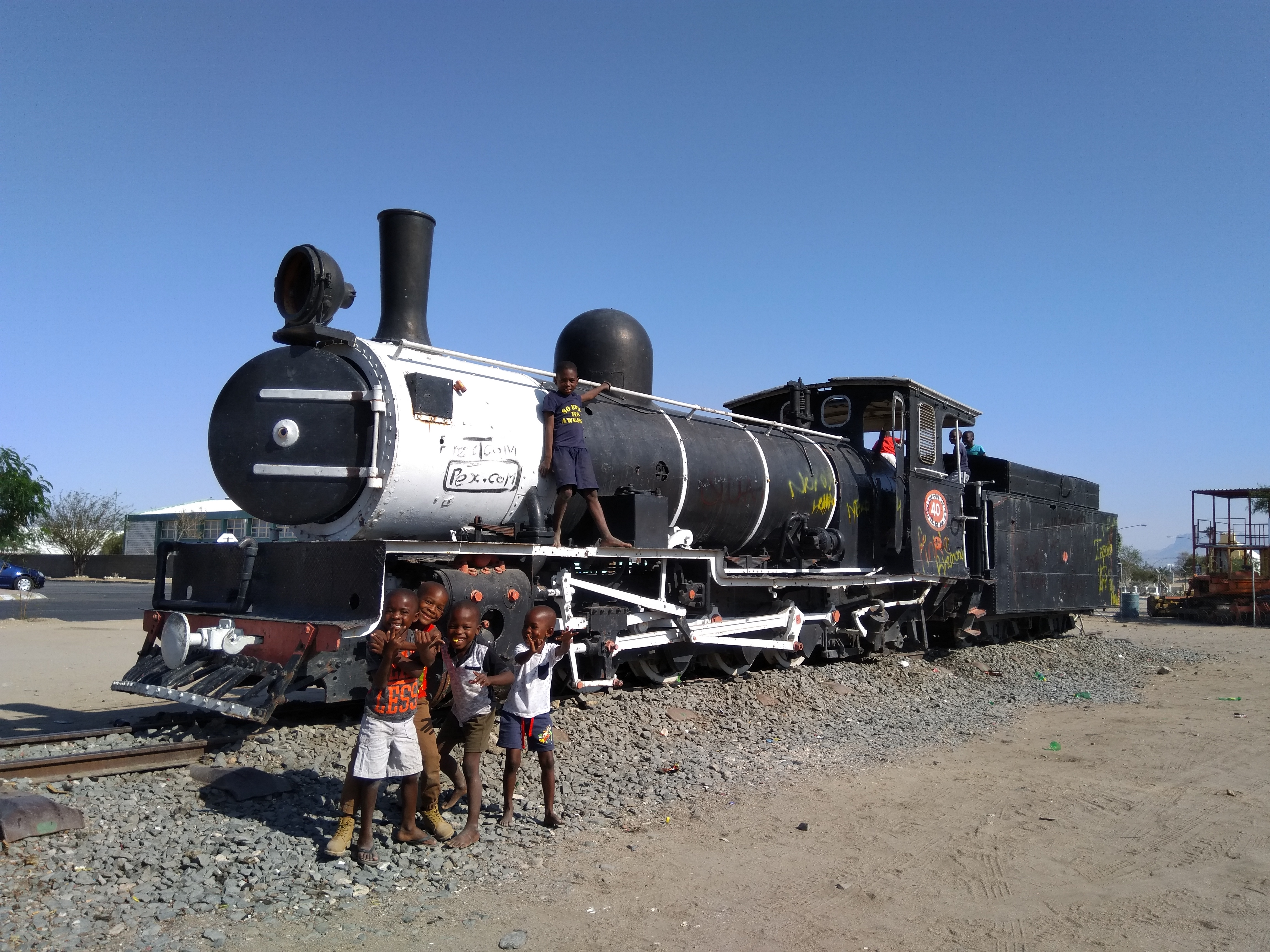 Alte Dampflokomotive am Bahnhof in Usakos